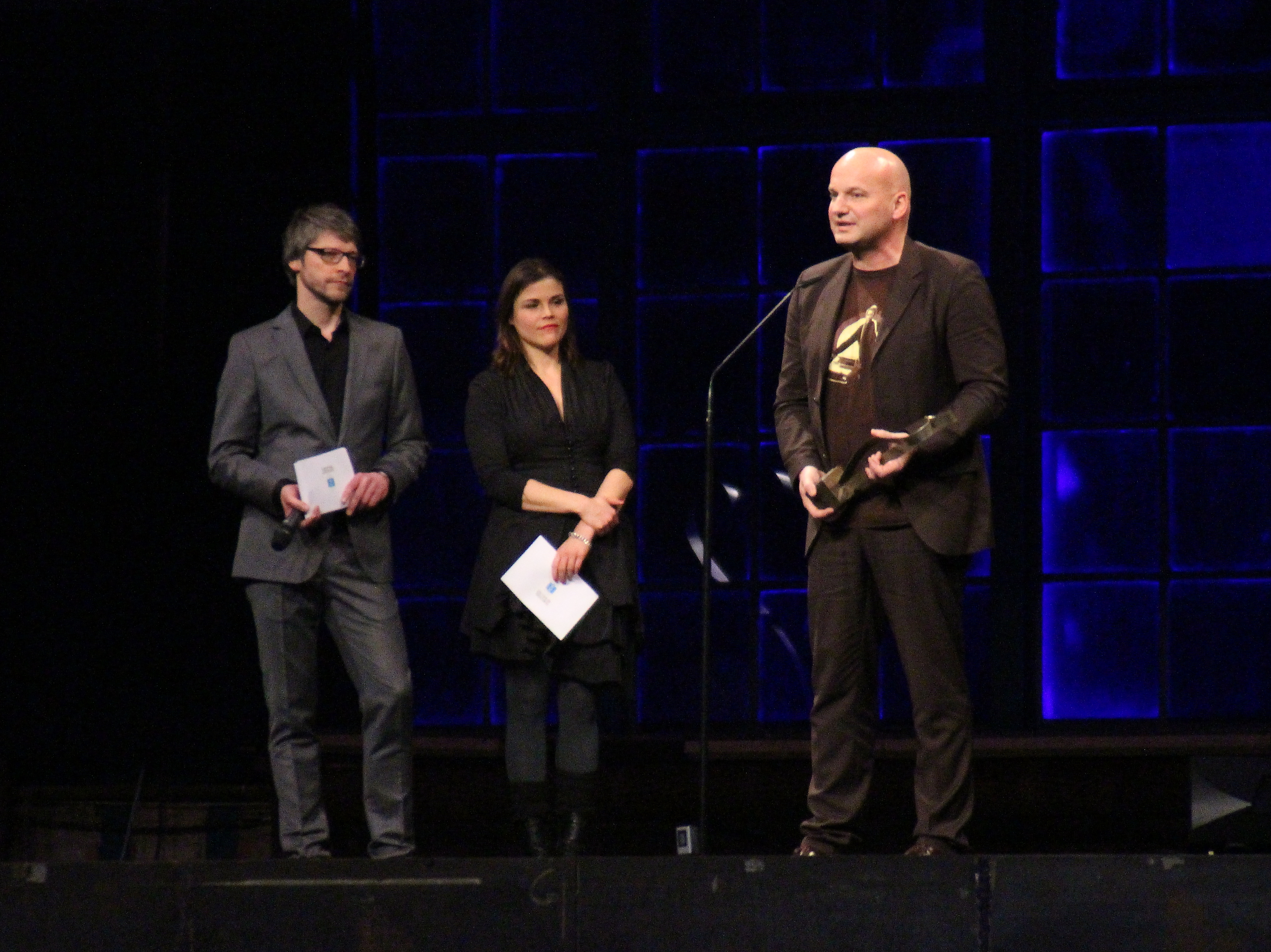 Marc Brummund bei der Übergabe des Publikumspreises für Freistatt beim Max-Ophüls-Festival